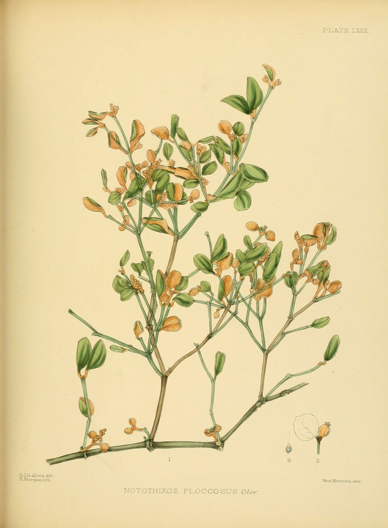 PLATE LXXX. G.DeAlwis del. RMor-ganlitll. NOTOTHIXOS FLOCCOSUS OUss. 'VVest.Newtjiaai.'Lmp .